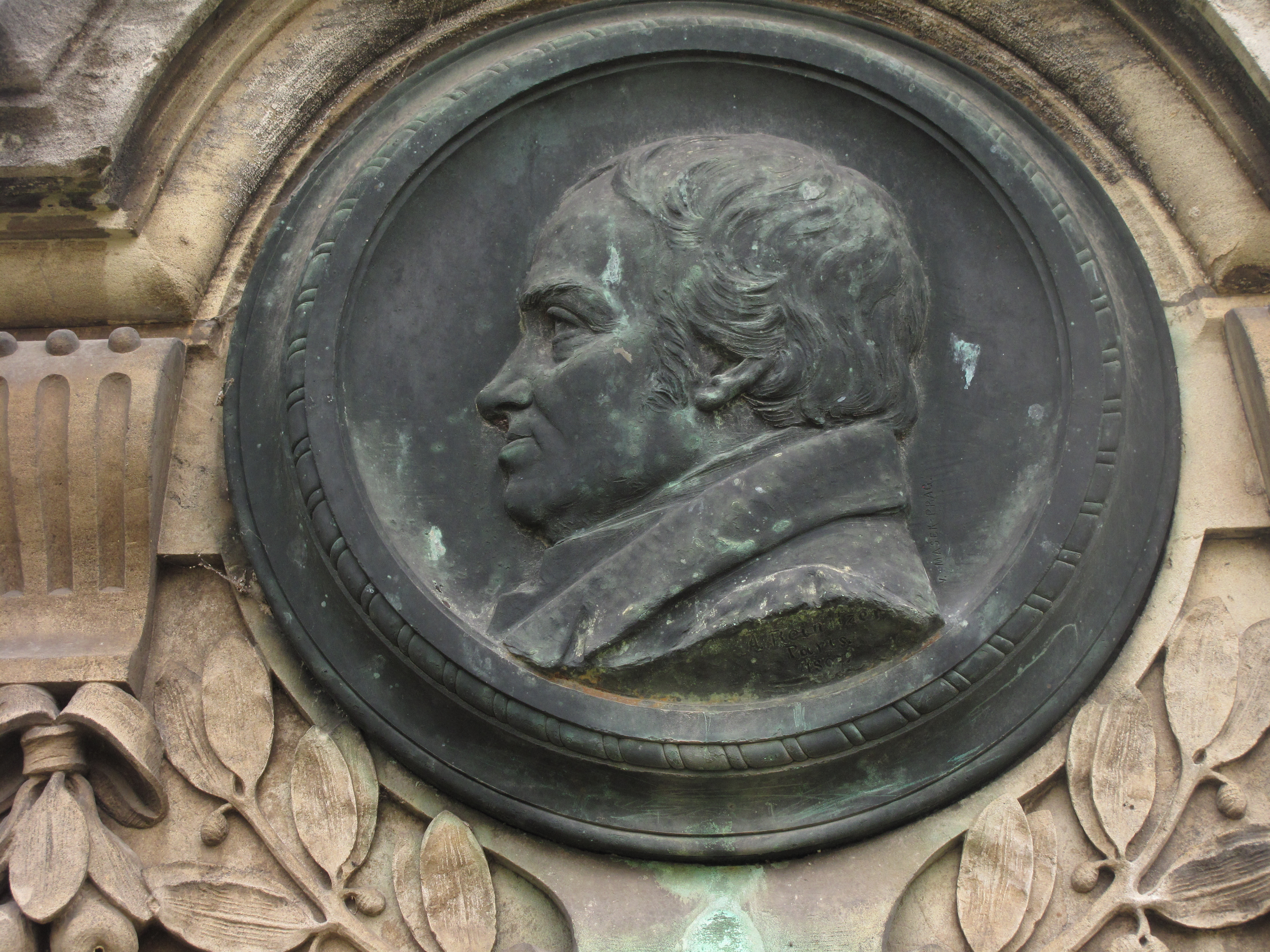 Reliéf v Kyselce (Bílina). Okres Teplice, Česká republika.